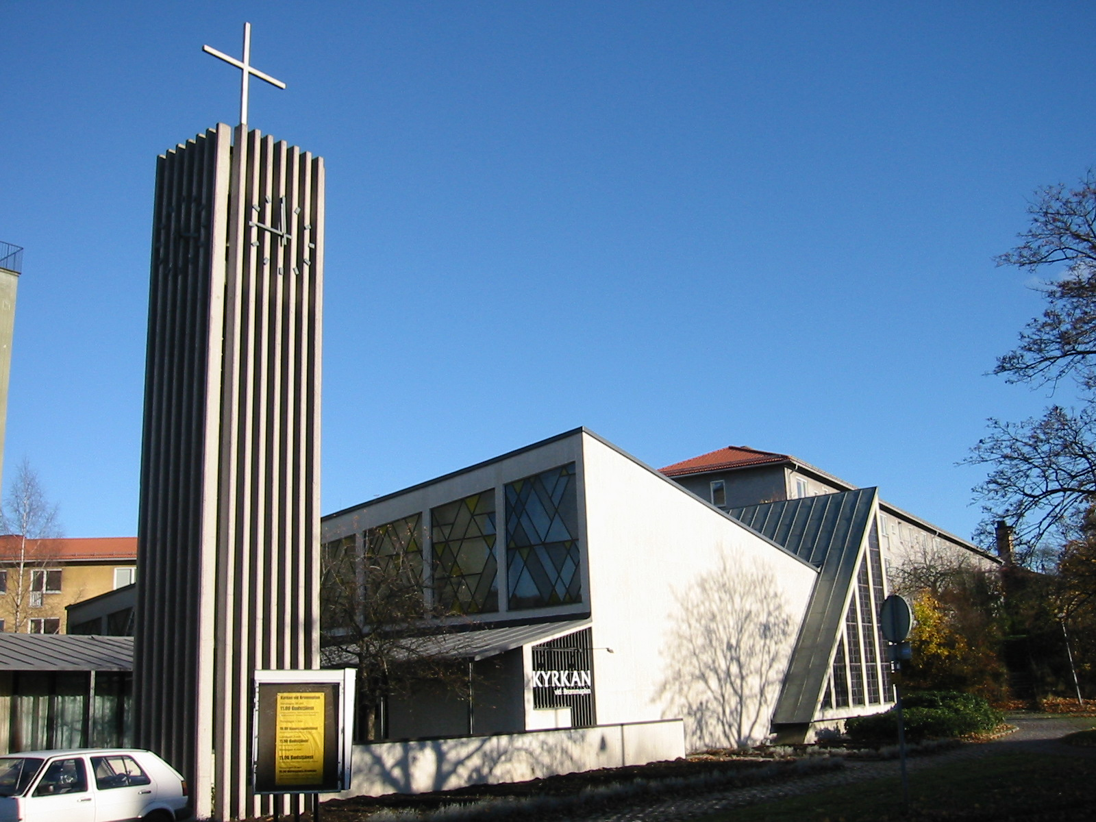 Kyrkan vid Brommaplan